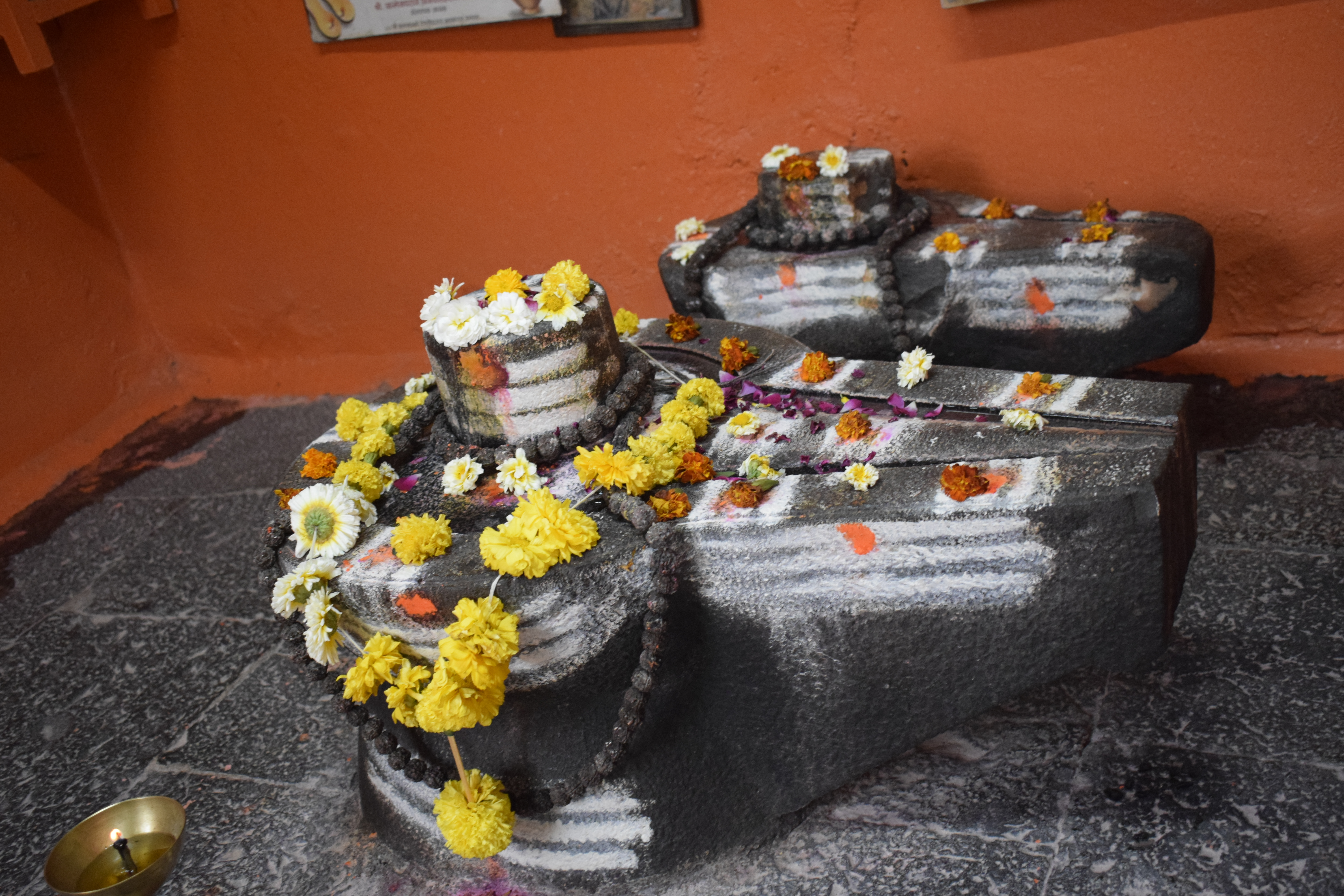 श्री खयेश्वर लिंग